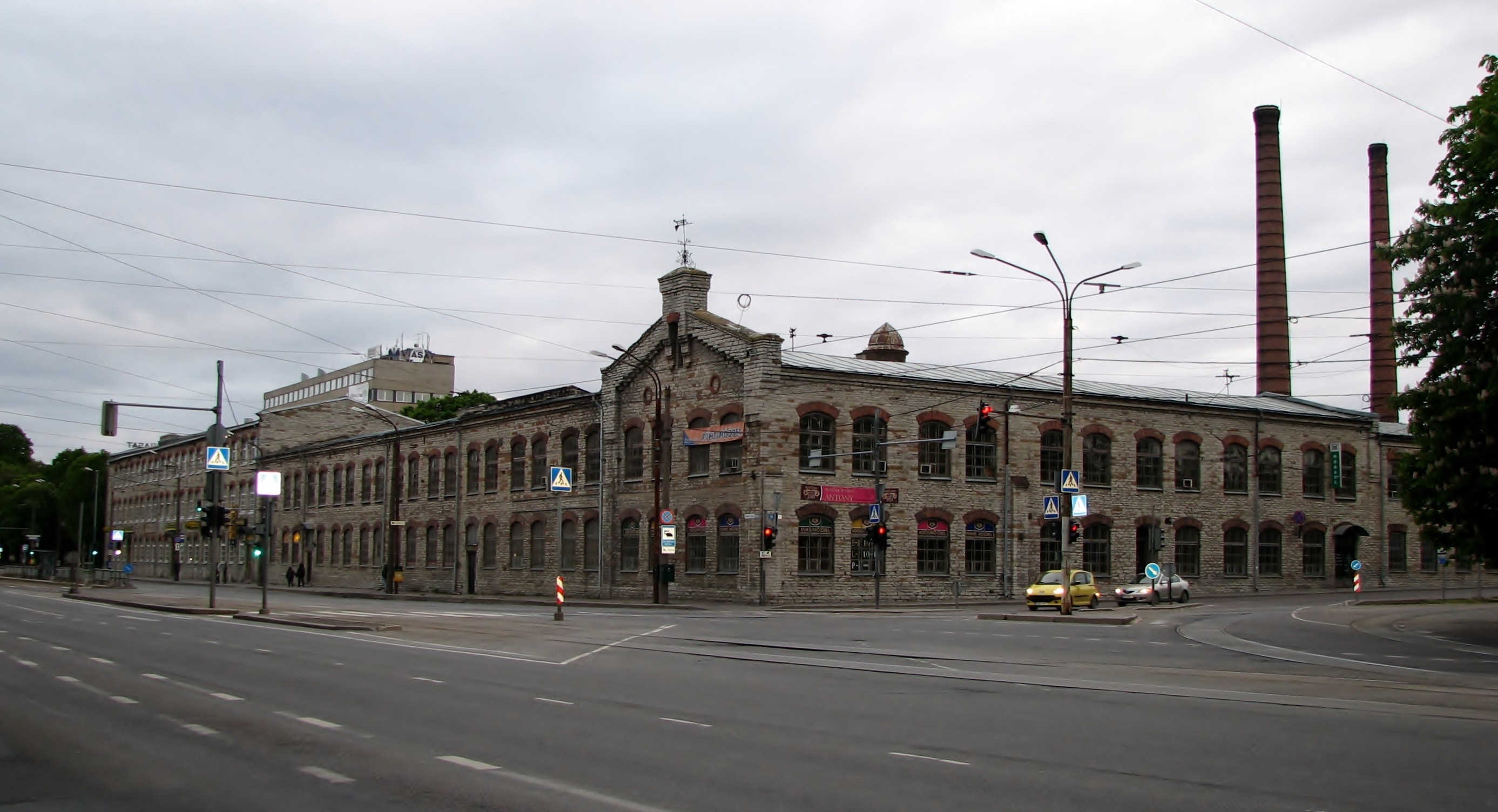 A/s A.M.Luther Vineeri- ja Mööblivabriku tööstushooned Pärnu mnt 69, 1897–1919